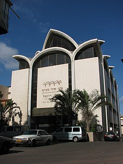 הבניין של מרכז חסידי נדבורנה בקרית נדבורנה